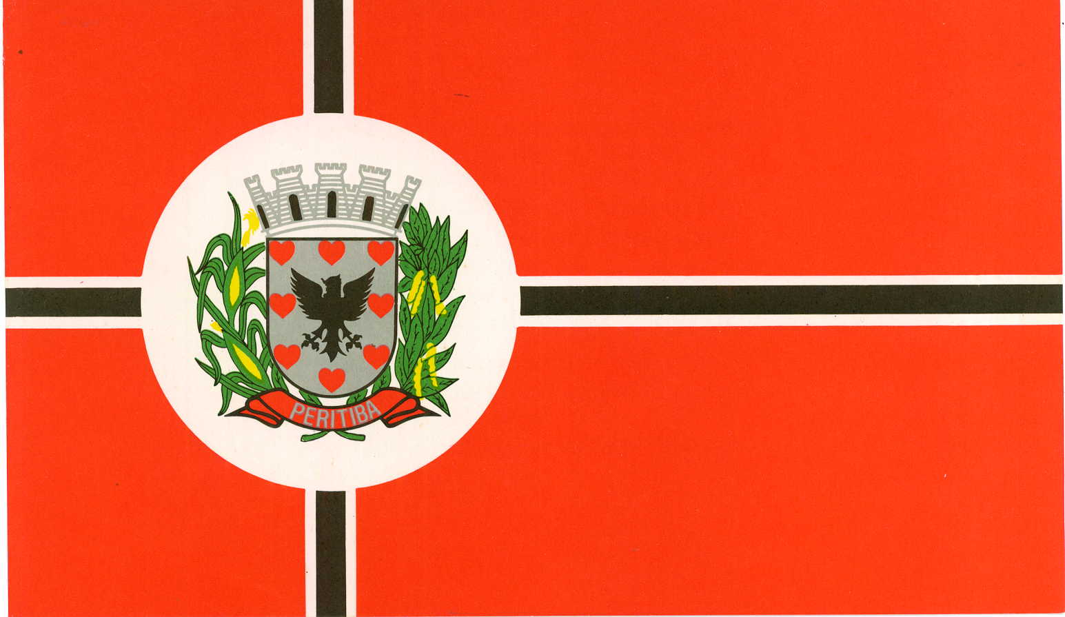 Drapeau de la municipalité de Peritiba - Brésil